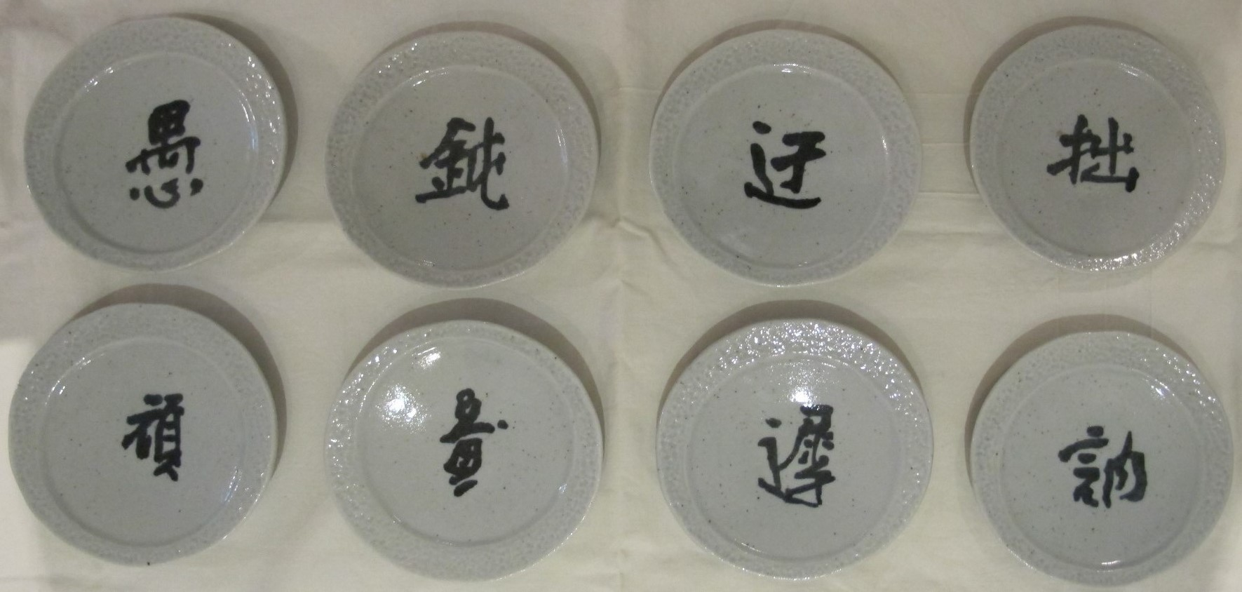 Kalligraphie von Aizu Yaichi